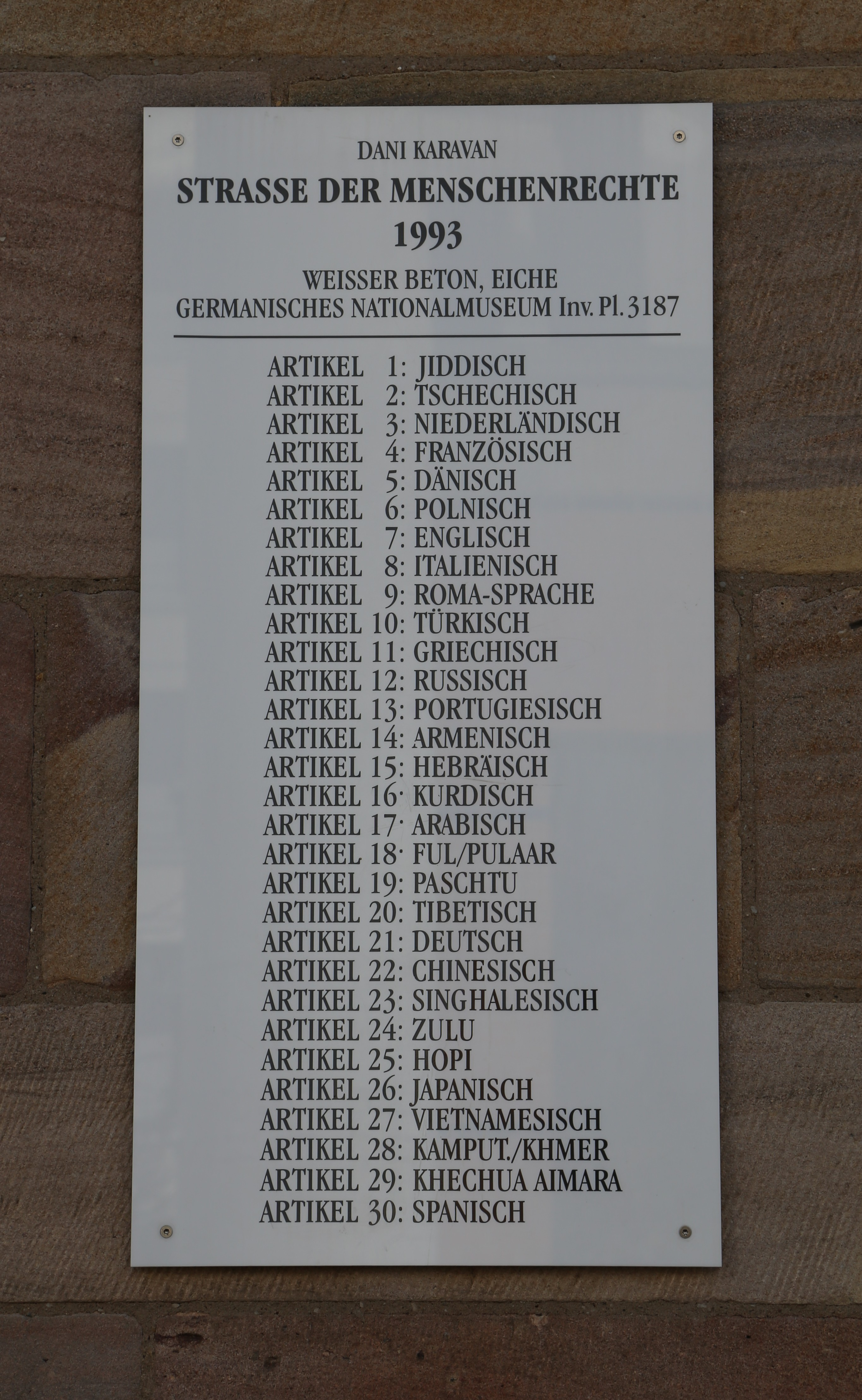 Straße der Menschenrechte, Germanisches Nationalmuseum, Nürnberg